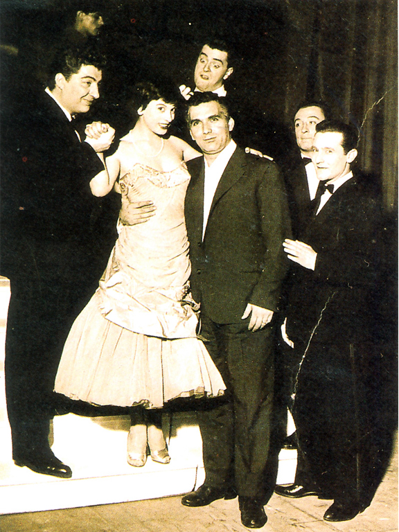 "S.P.Q.M Sono portentosi questi milanesi" Produzione Bataclan 1953